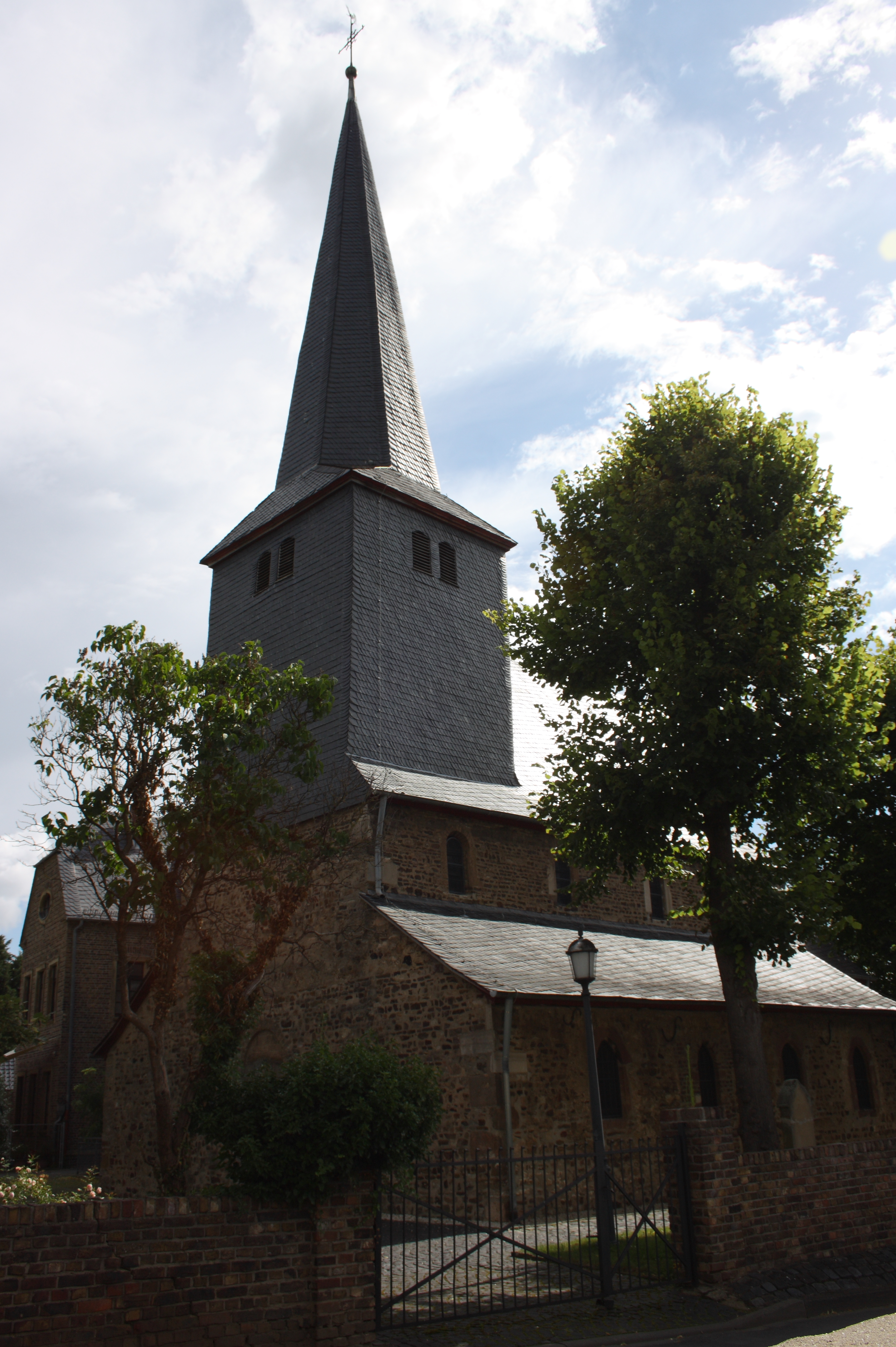 Alte katholische Pfarrkirche St. Peter und Paul in Odendorf, einem Ortsteil von Swisttal im Rhein-Sieg-Kreis (Nordrhein-Westfalen)